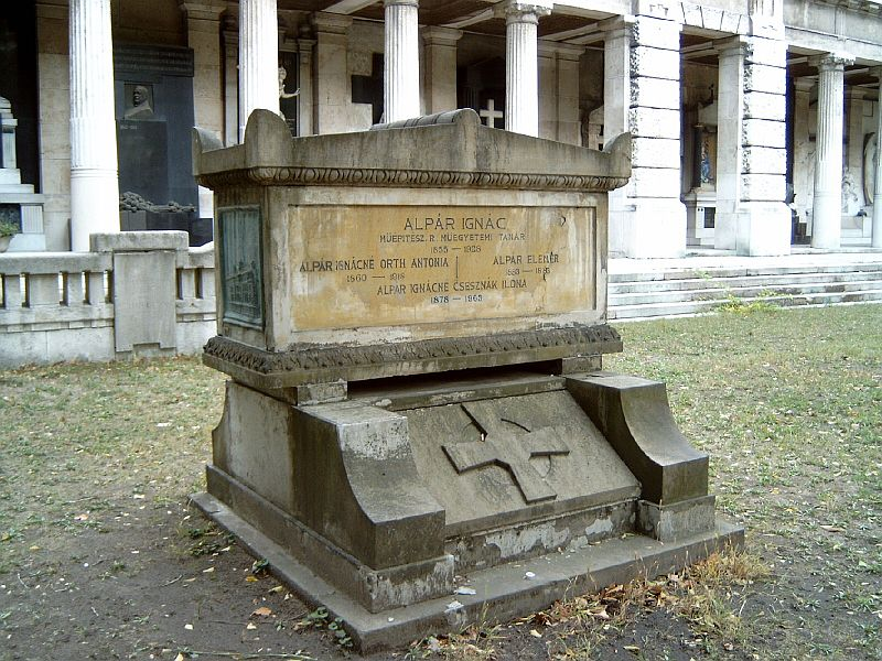 Alpár Ignác sírja Budapesten, a Kerepesi úti temetőben. Szege Sándor szobrászművész és Kotál Henrik építész alkotása (1929)